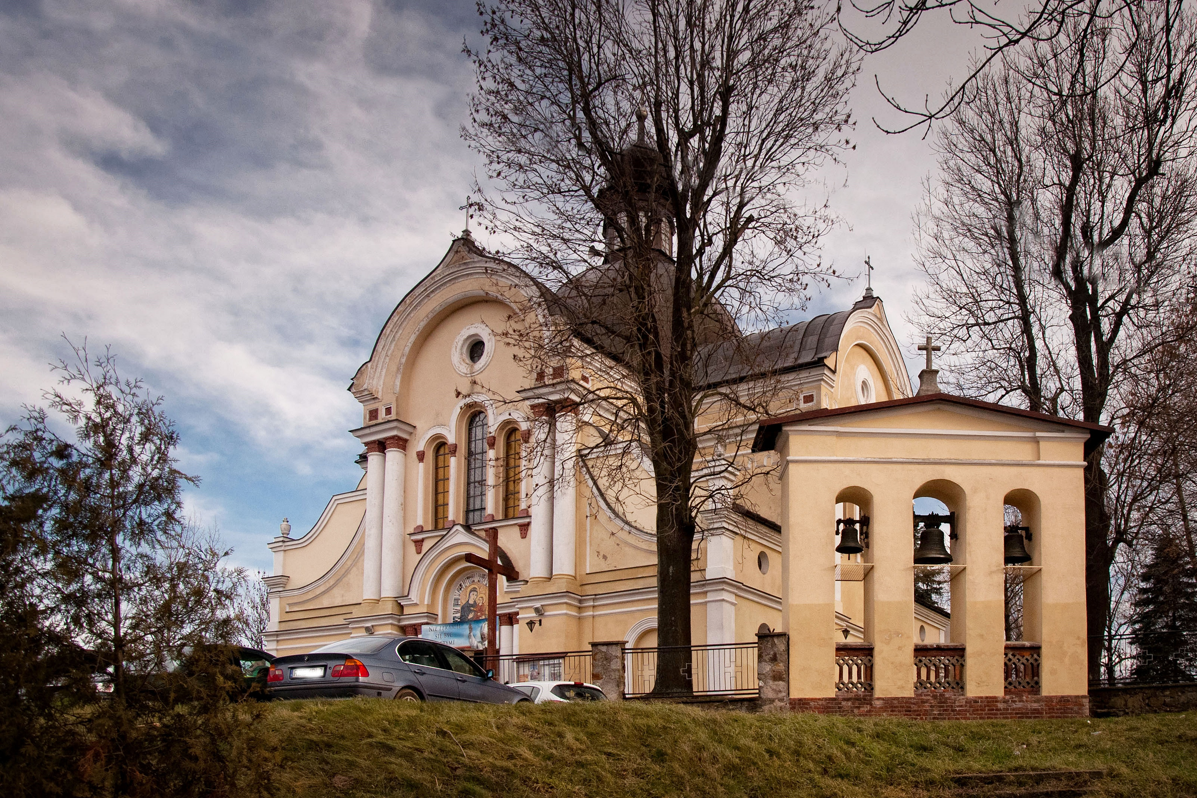 Rzeszów, ul. Zelwerowicza 2 - pierwotnie cerkiew greckokatolicka, obecnie rzymskokatolicki kościół parafialny pw. Wniebowzięcia NMP, 1889